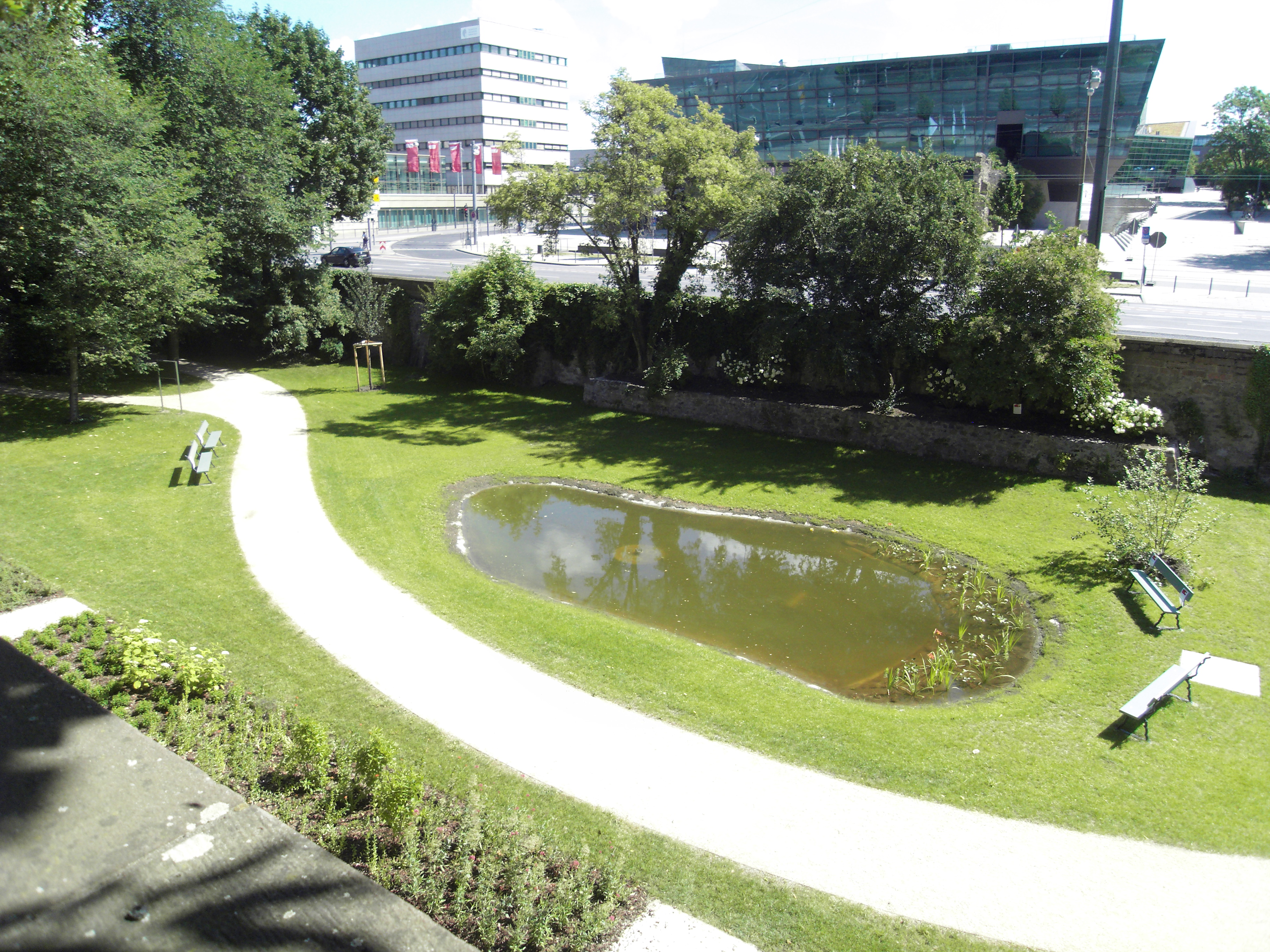 Park im Schlossgraben Darmstadt Einweihung